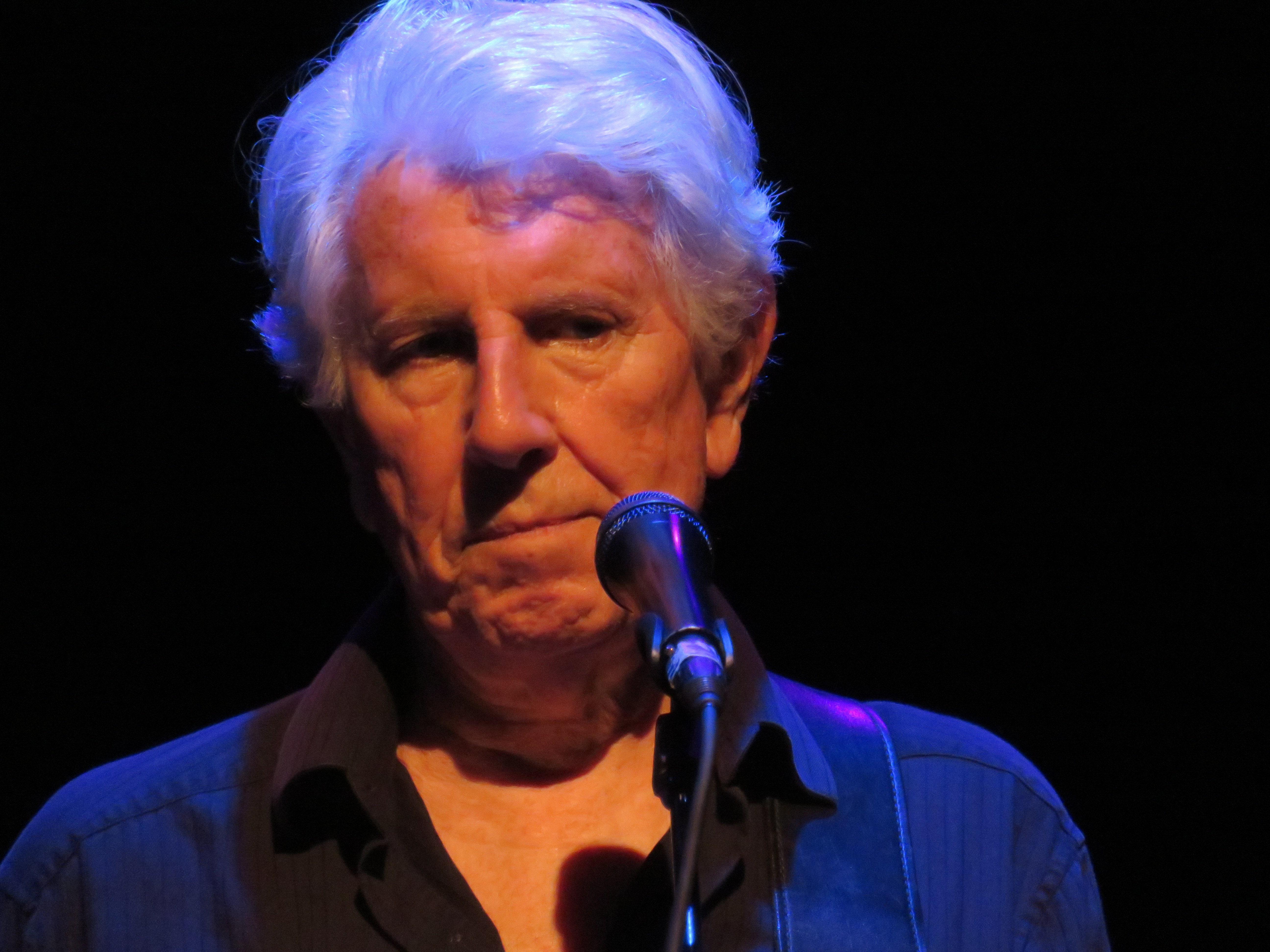 Live in Ostend, Belgium